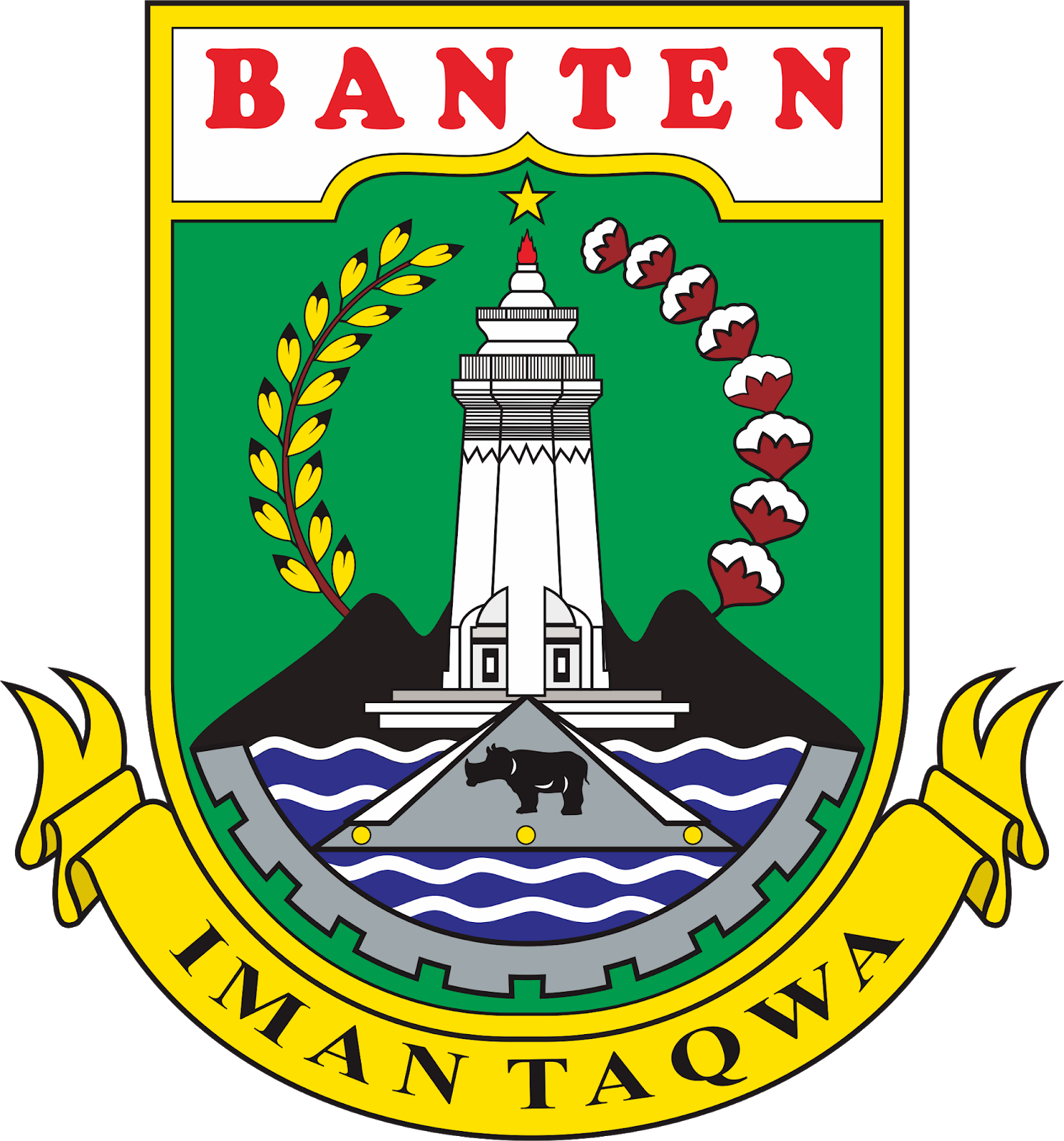 Lambang Provinsi Banten